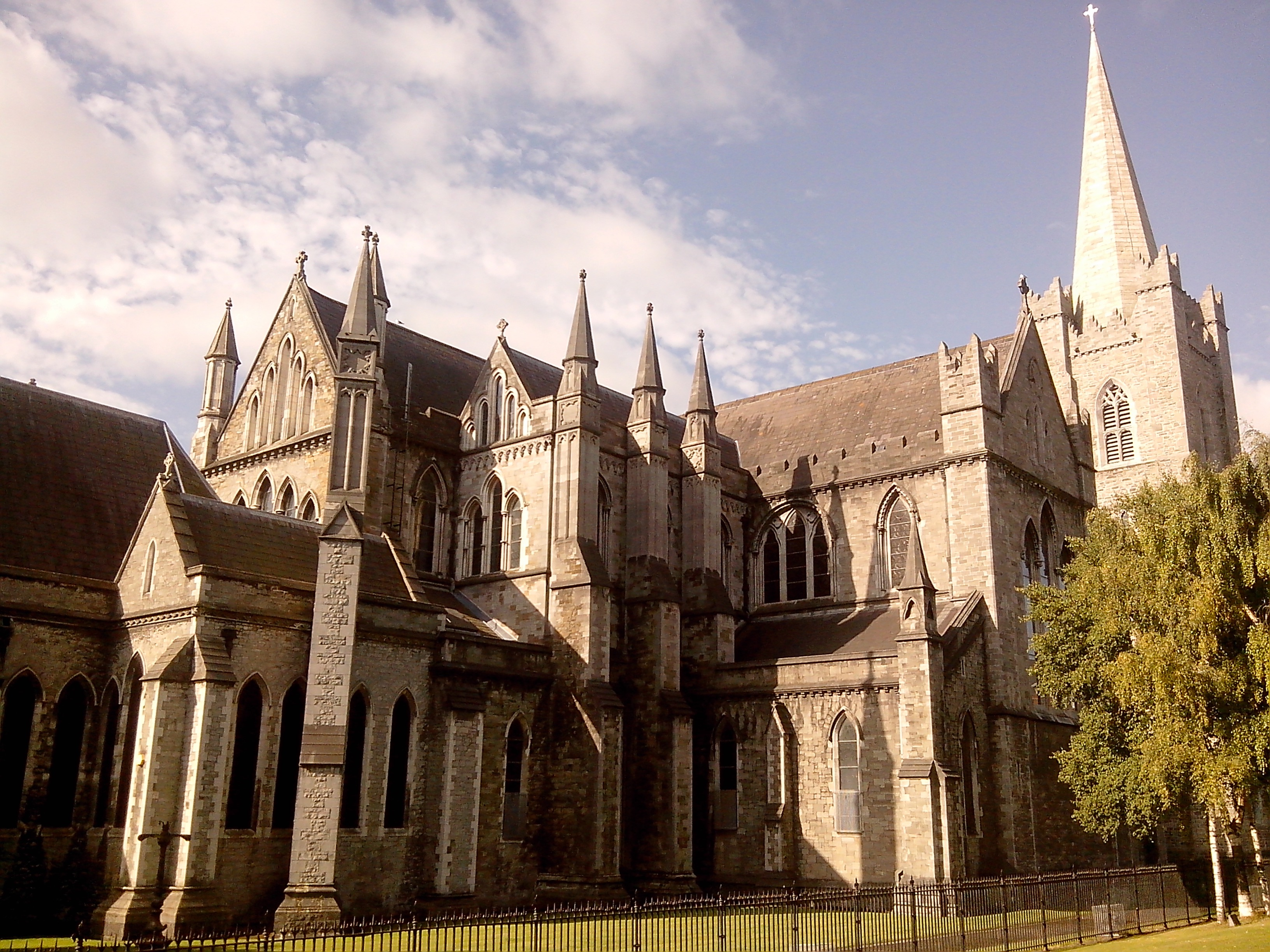 La cathédrale Saint-Patrick de Dublin, prise depuis le St Patrick's Park